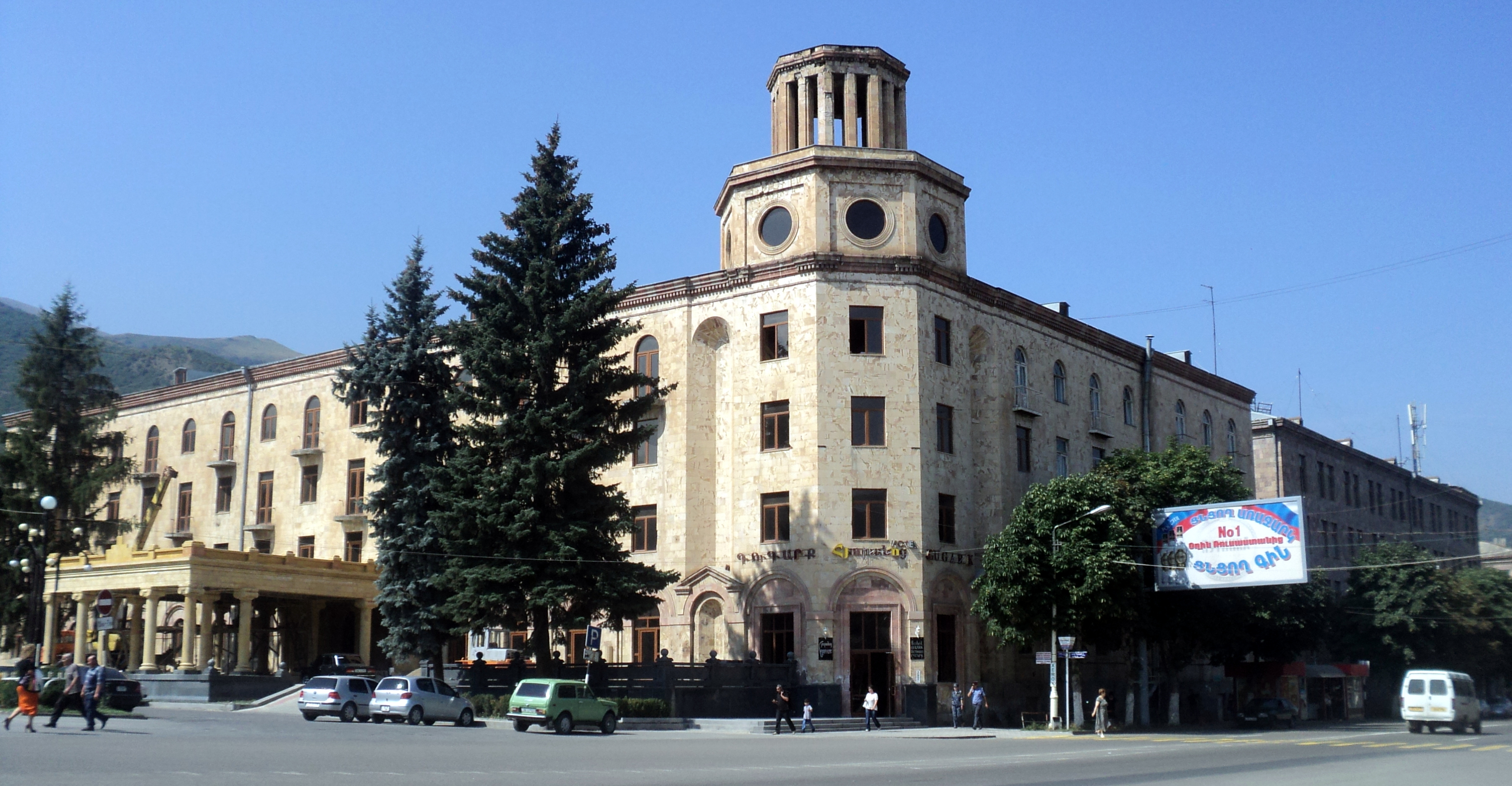 Գտնվում է Լոռու մարզպետարանի ձախ կողմում 1/48